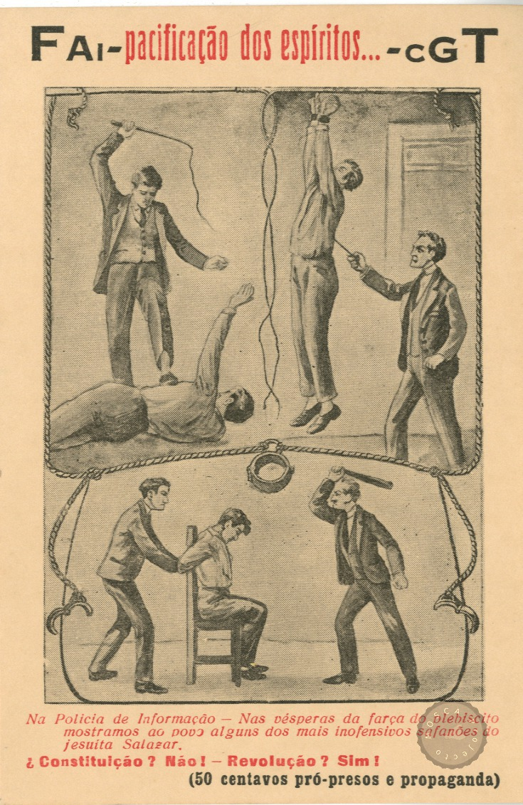 "A Pacificação dos Espíritos"/ F.A.I.-C.G.T: folheto ilustrado de propaganda das torturas praticadas pela polícia e de solidariedade com os presos sociais.